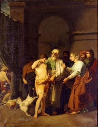 Jean-Gustave Taraval, La parabole de l'enfant prodigue, 1782, Soissons, musée municipal